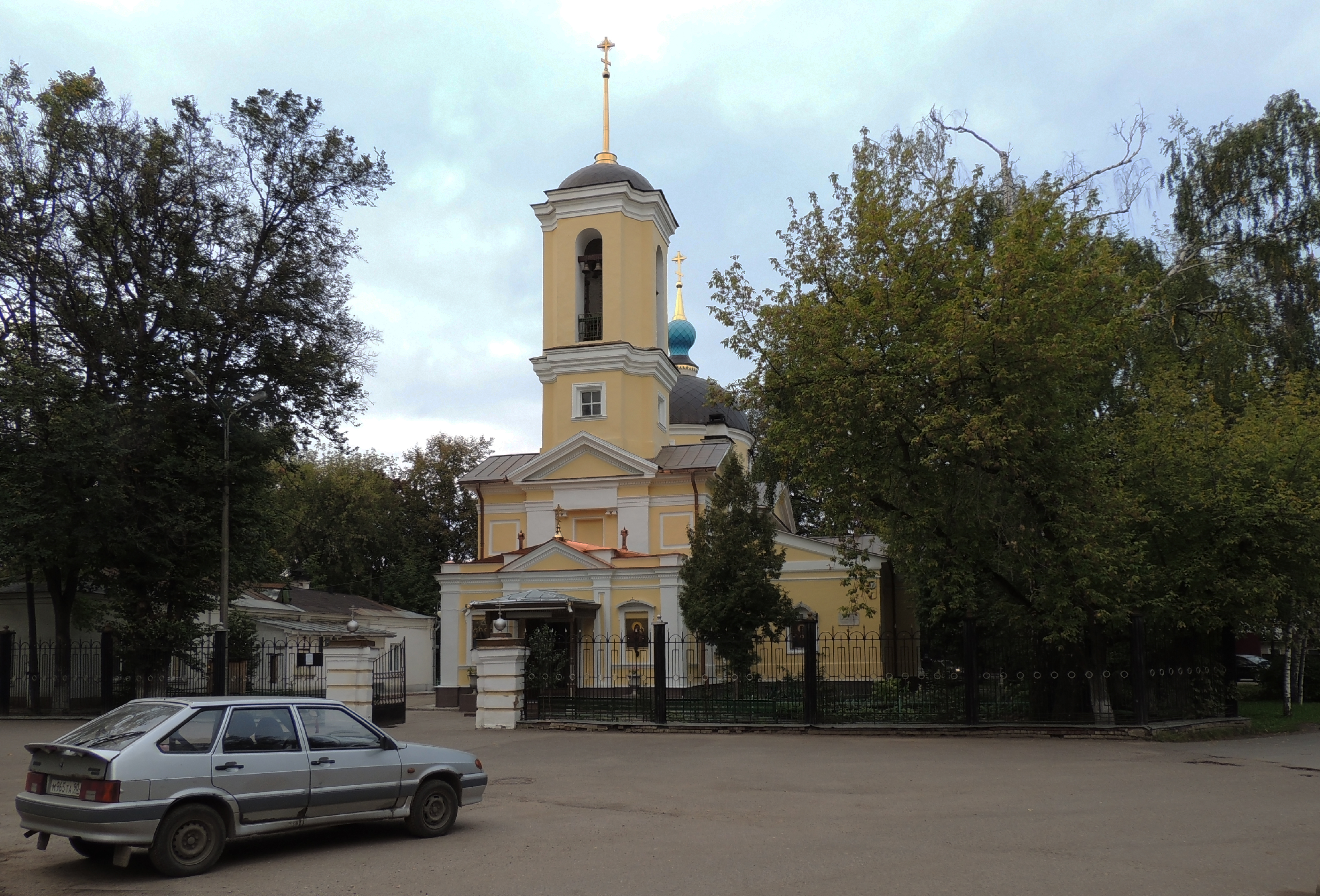 Церковь бессребреников Космы и Дамиана (Москва и Московская область, Юбилейный, село Болшево (бывш. ))